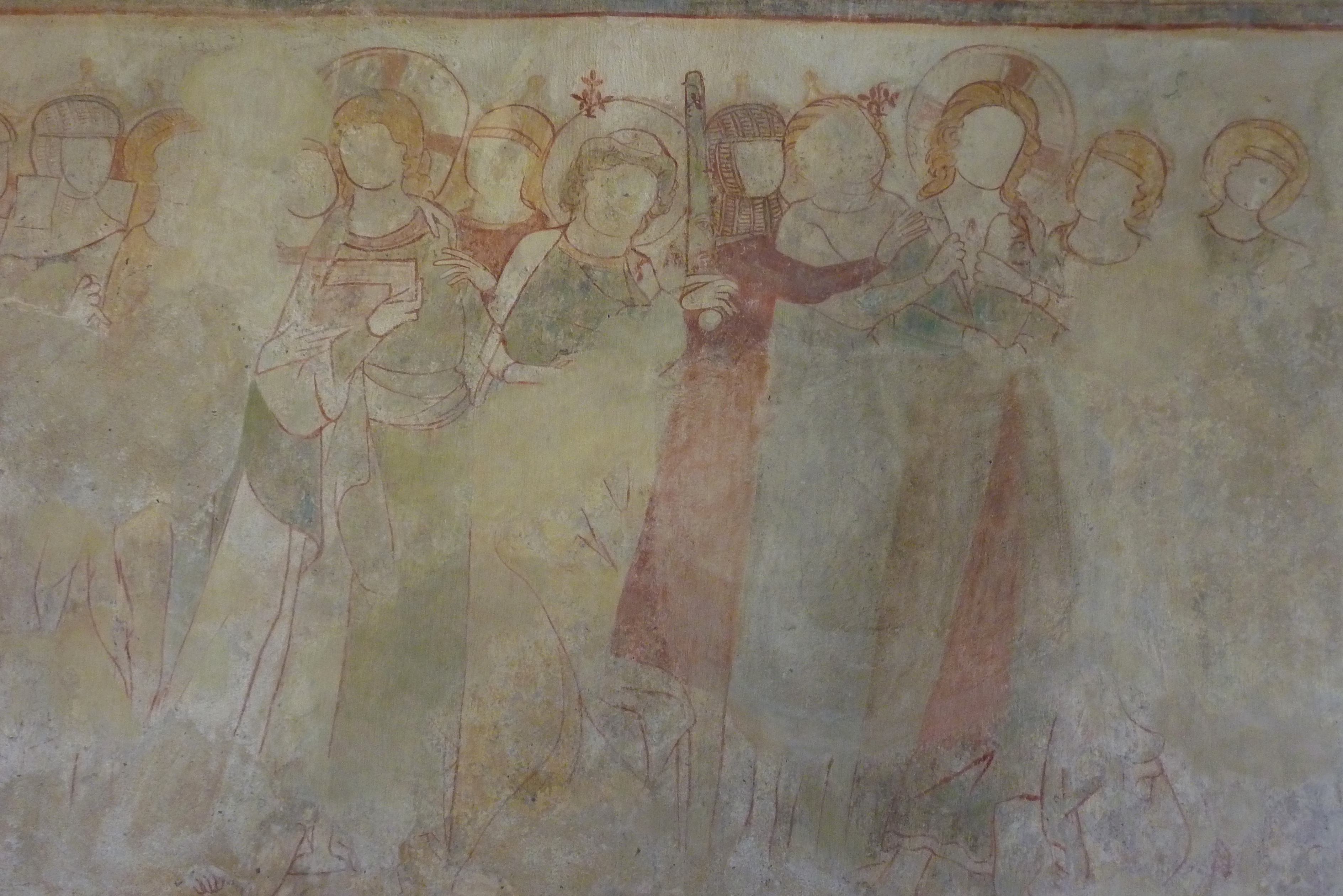 Gotische Wandmalerei in der Peterskapelle in Spay, Darstellung: Gefangennahme Jesu